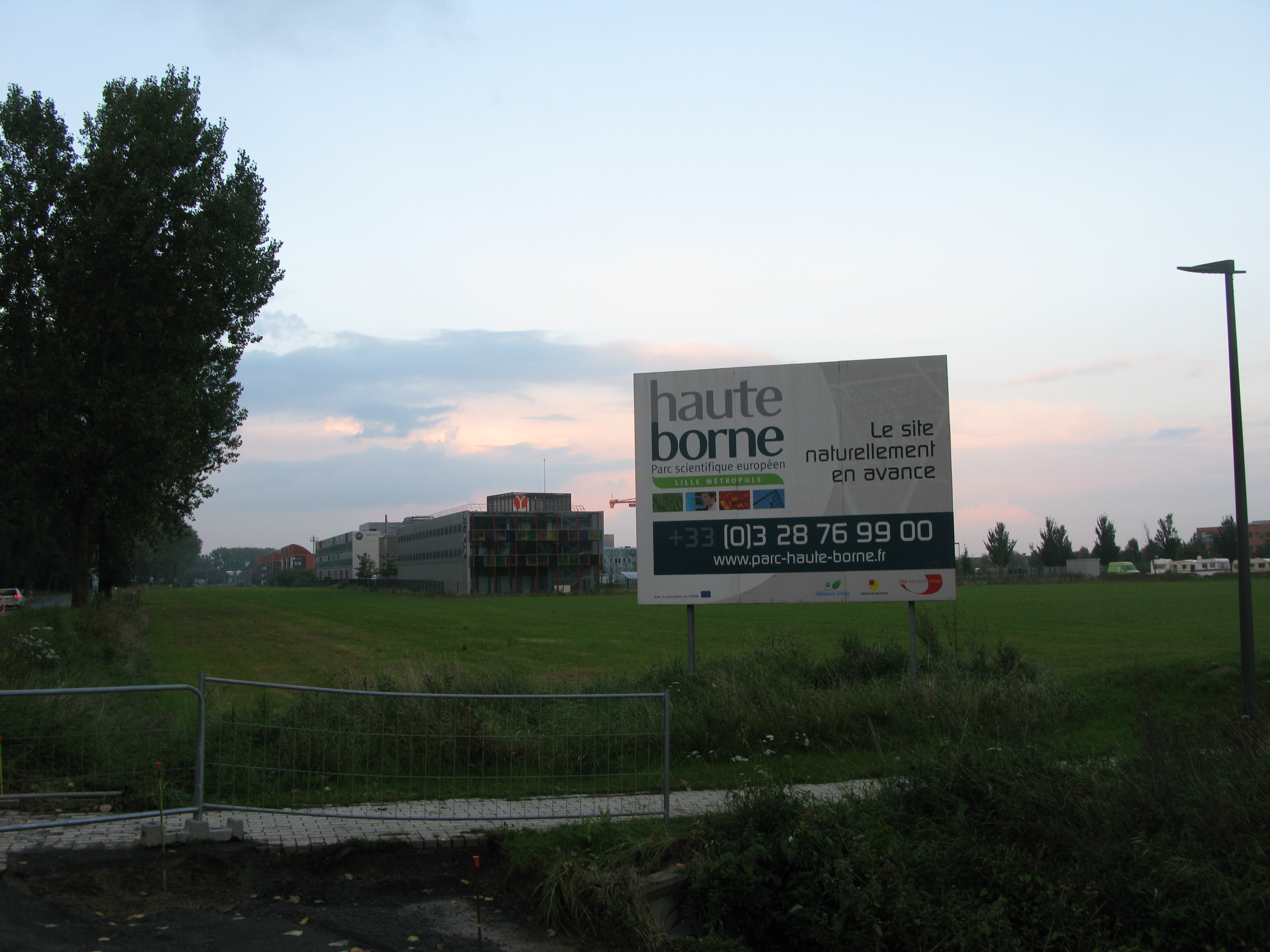 Entrée de la Haute Borne en venant de 4 cantons, à Villeneuve d'Ascq.